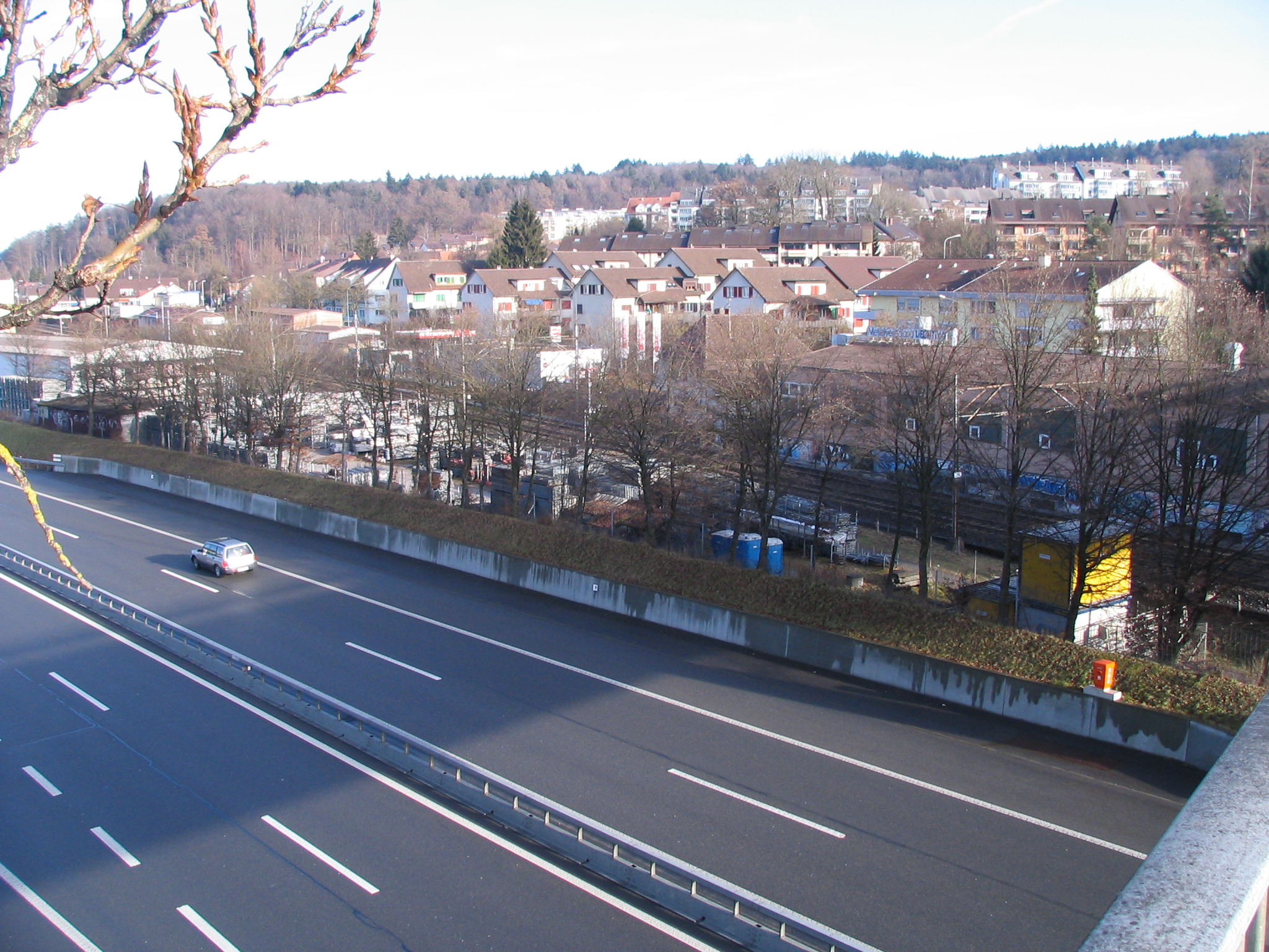 Im Zentrum der Ortschaft Niederwangen (Kanton Bern, Schweiz): Autobahn, Eisenbahn, Gewerbe- und Wohnbauten